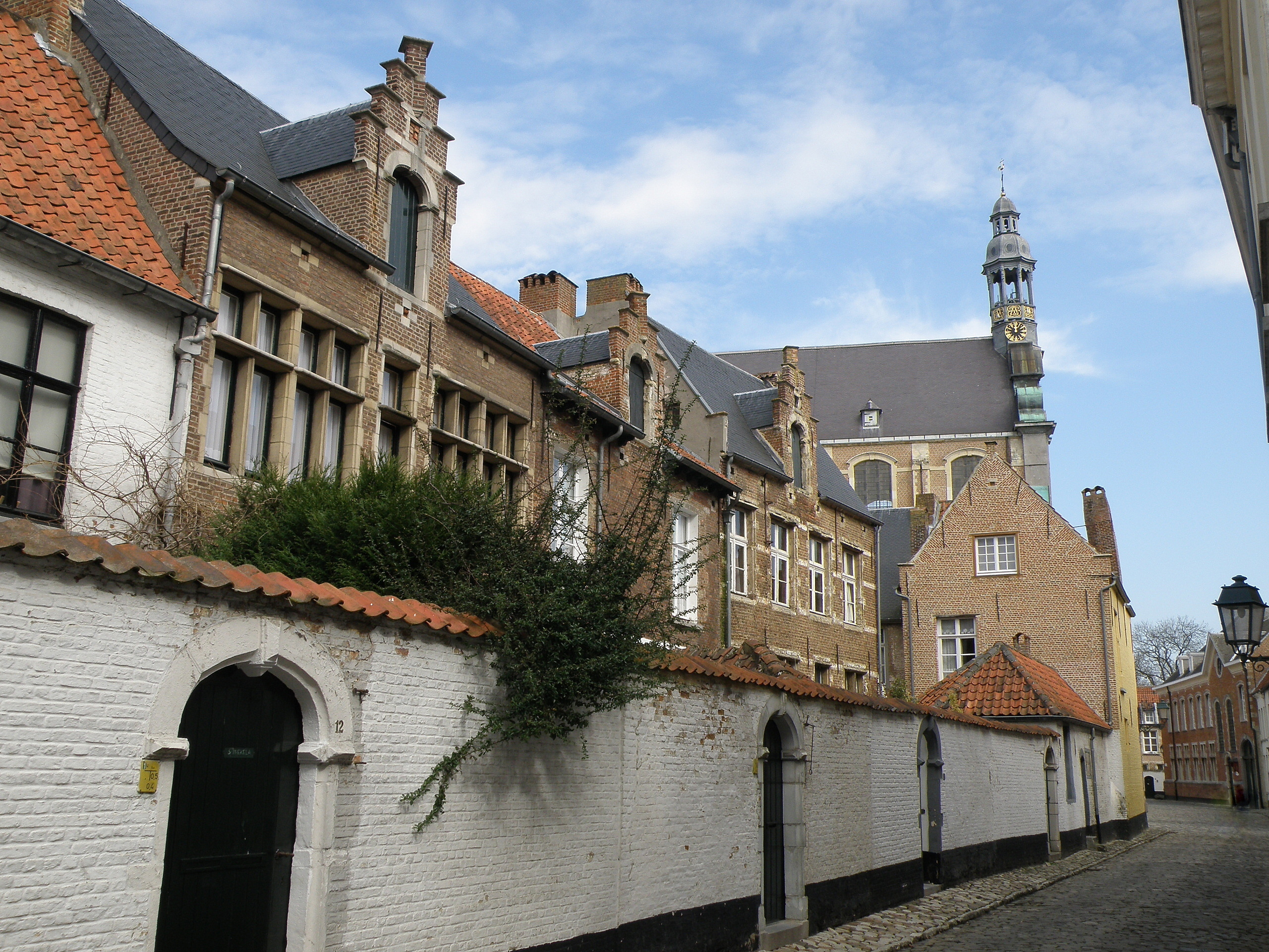 Lierre (en néerl. Lier), ville de Flandre (Belgique), située à une quinzaine de km. au sud-est d’Anvers. Sint-Margarethastraat (ou Sint-Margaretastraat, sans h ; litt. rue Saint-Marguerite), une des rues du béguinage. On aperçoit, de gauche à droite : maison Sint-Thecia (au n° 12, visible partiellement, XVIIe siècle, baies remaniées ultérieurement) ; maison De Dry Coningen (les Rois mages, au n° 10, de style néo-traditionnel, de 1938) ; maison Sint-Bruno (au n° 8, XVIIe siècle) ; maison De Wijngaert des Heeren (litt. la Vigne du Seigneur, au n° 6, XVIIe siècle) ; maison Sint-Ursula (au n° 4, bordant directement la rue, sans jardinet, remontant au XVIIe, mais remaniée) ; derrière cette dernière émerge à l’arrière-plan la nef et le clocheton de l’église baroque Sainte-Marguerite.